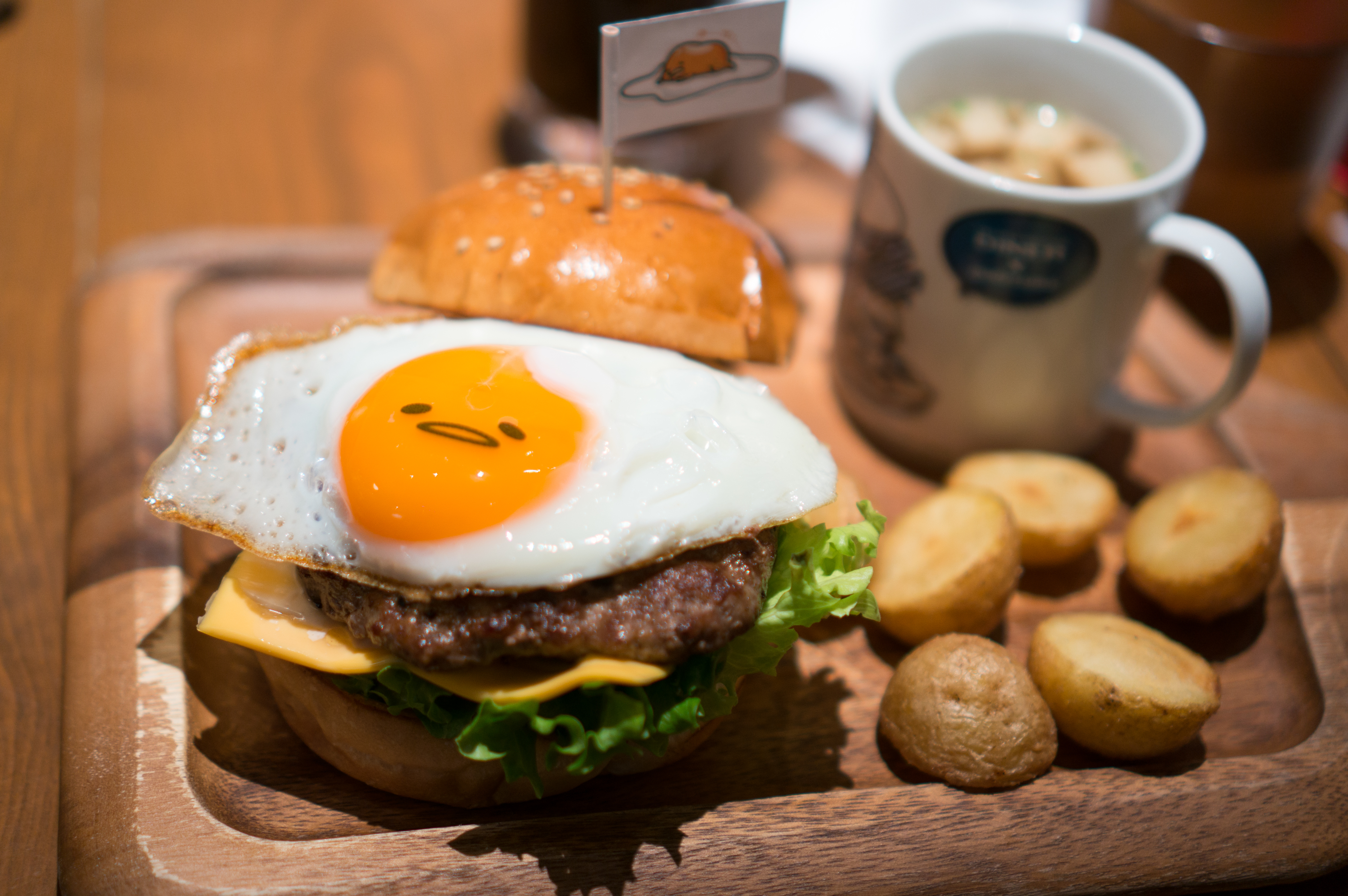 町田ルミネで食べた「ぐでたまバーガー」